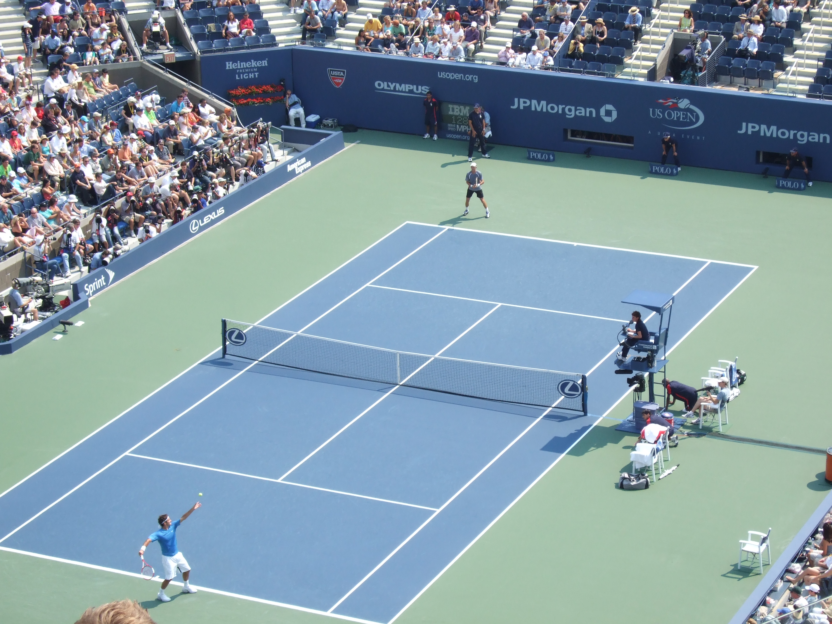 Roger Federer Against Nikolay Davydenko. US Open 2006